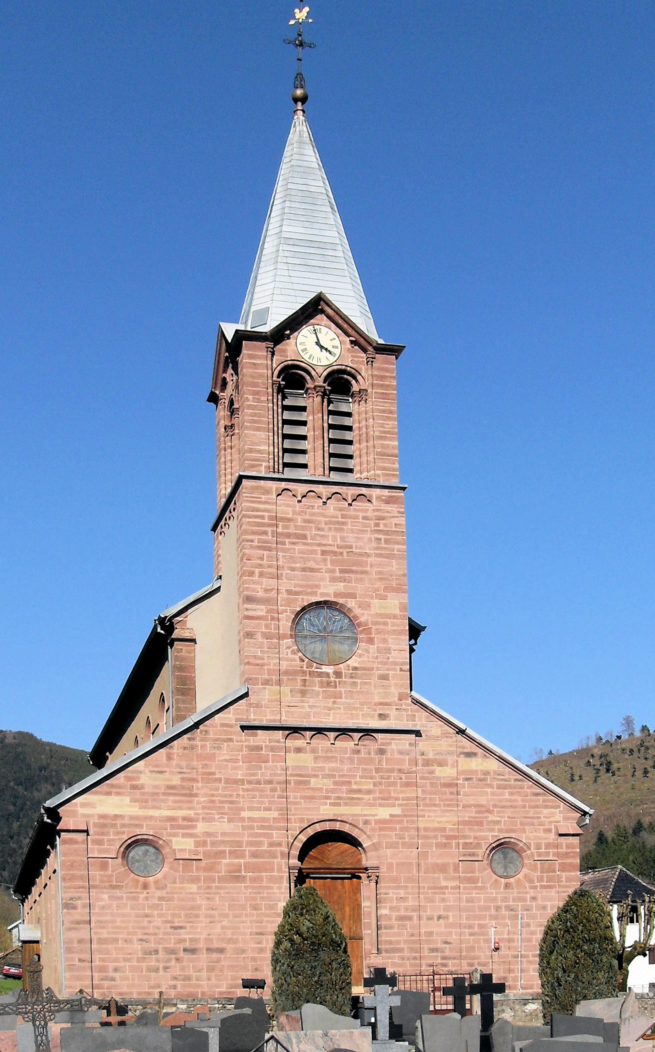 L'église Saint-Augustin à Rimbach-près-Masevaux